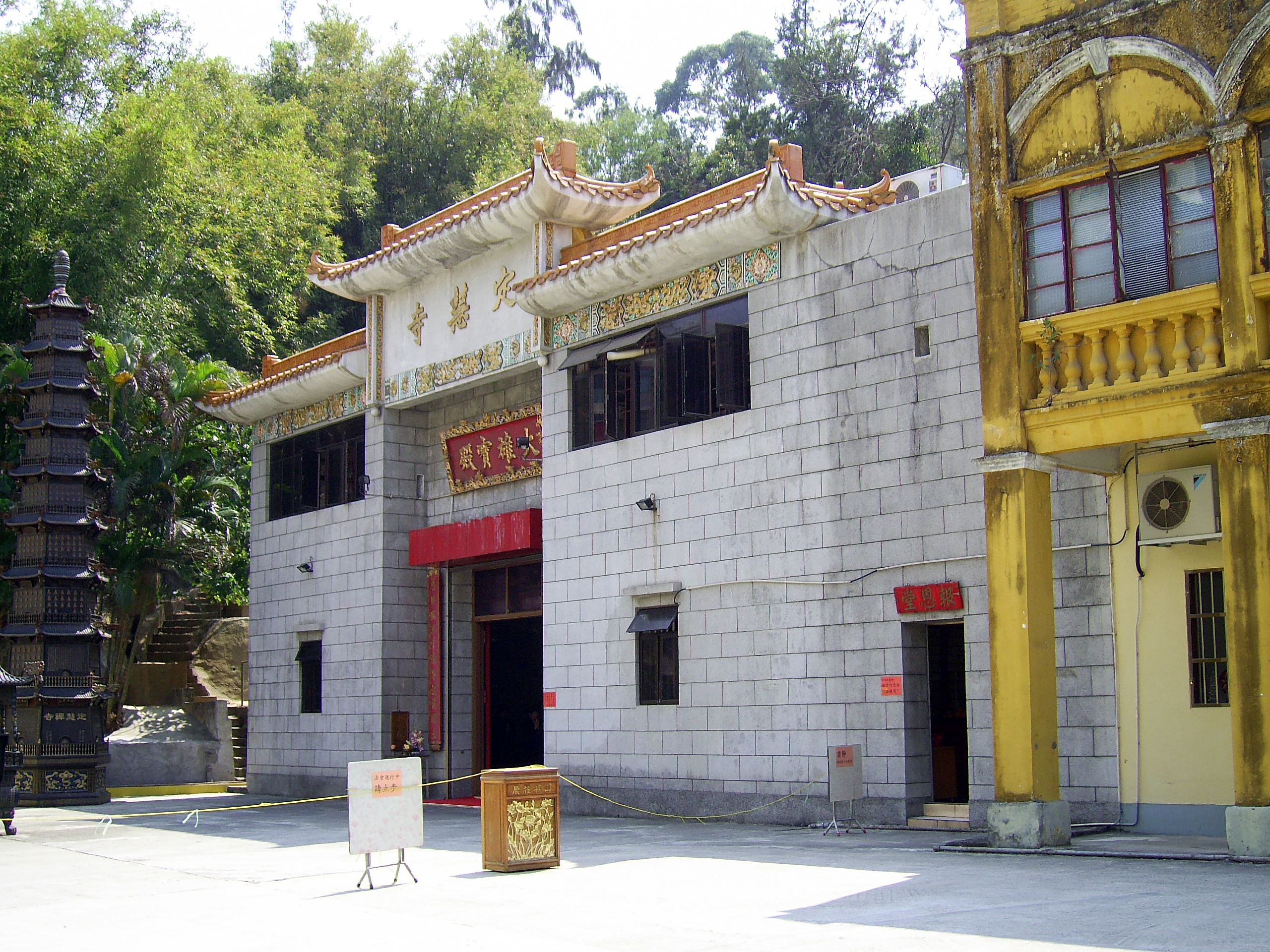 中文（香港）: 定慧寺大雄寶殿